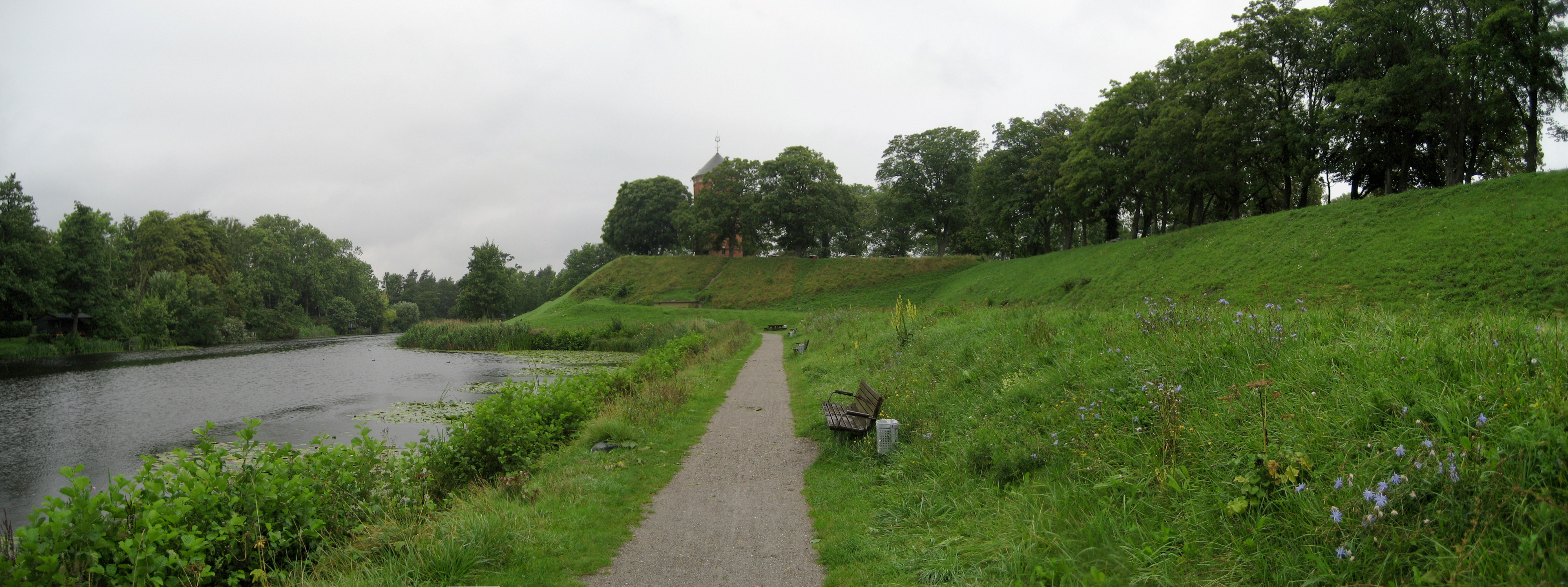 Nyborg, westliche Wallanlage